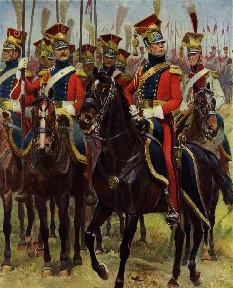 Lanciers rouges de la Garde impériale. Au centre, un officier et derrière lui, un trompette.